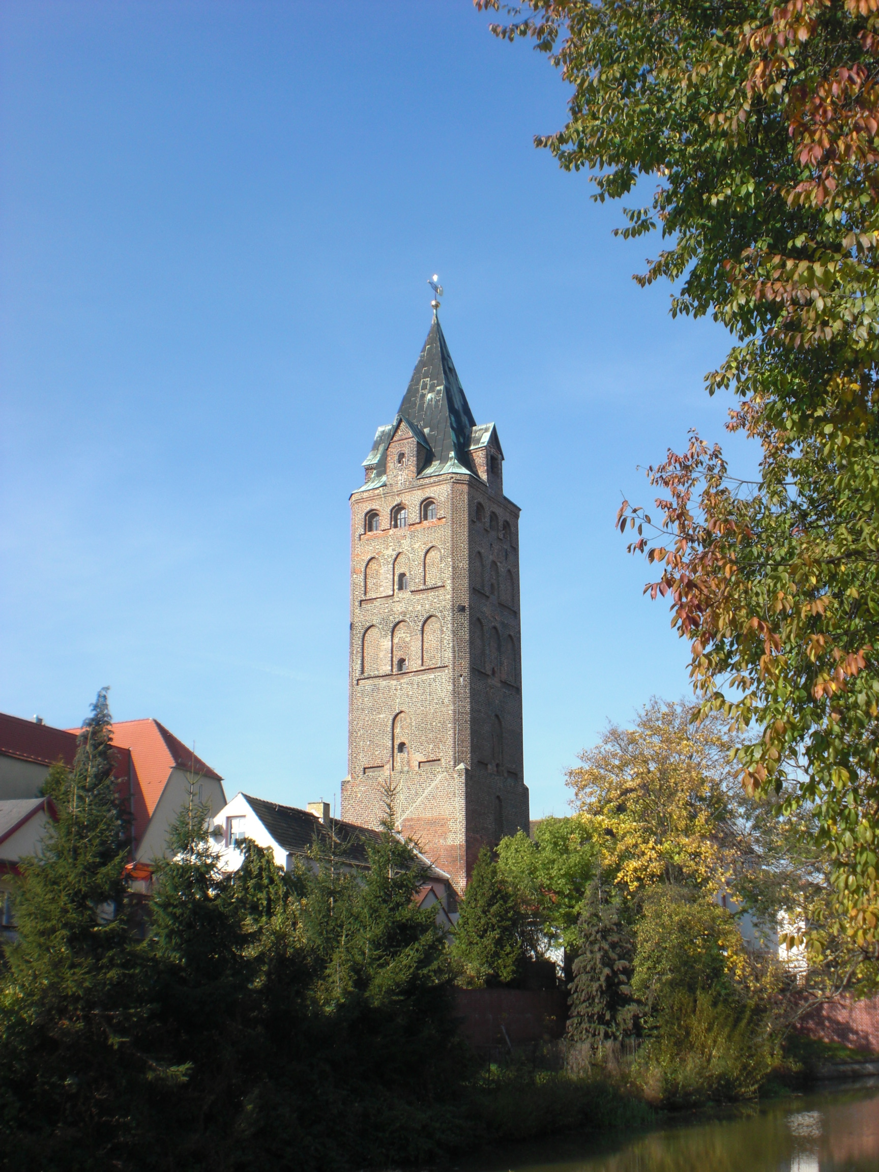 Breiter Turm, Delitzsch